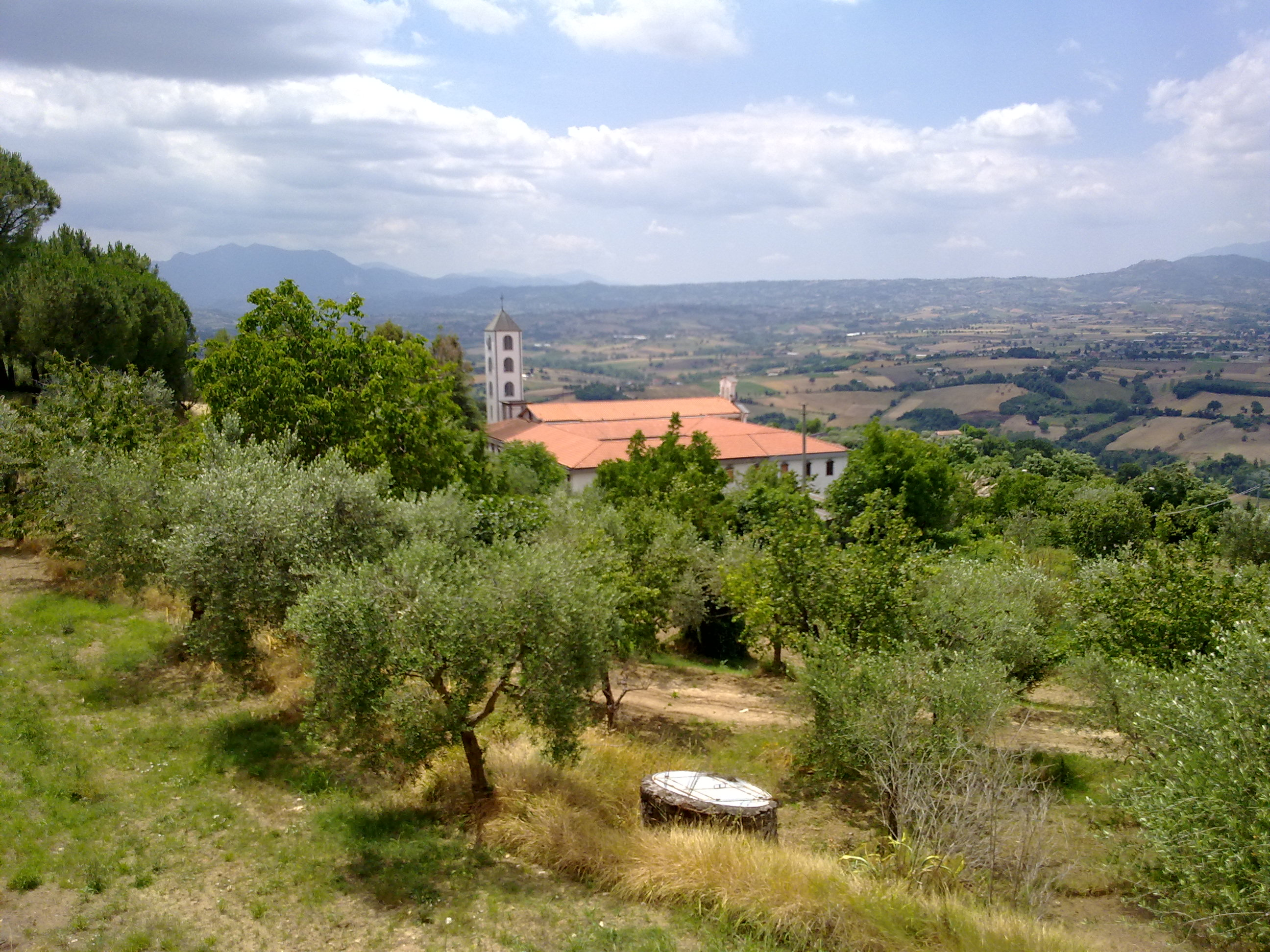 Santuario Sant'Antonio